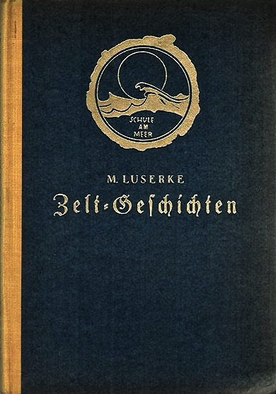 Buchdeckel; Martin Luserke: Zelt-Geschichten. Fremdartige Abenteuer, von denen im Zelt und am Feuer erzählt wurde. Zweiter Band: Die zwölf Legenden von dem Helden Sar Ubo mit der silbernen Hand. (= Die Bücher der Schule am Meer), Angelsachsen-Verlag, Bremen 1926; Goldprägung des Titels und der Bildmarke der Schule am Meer